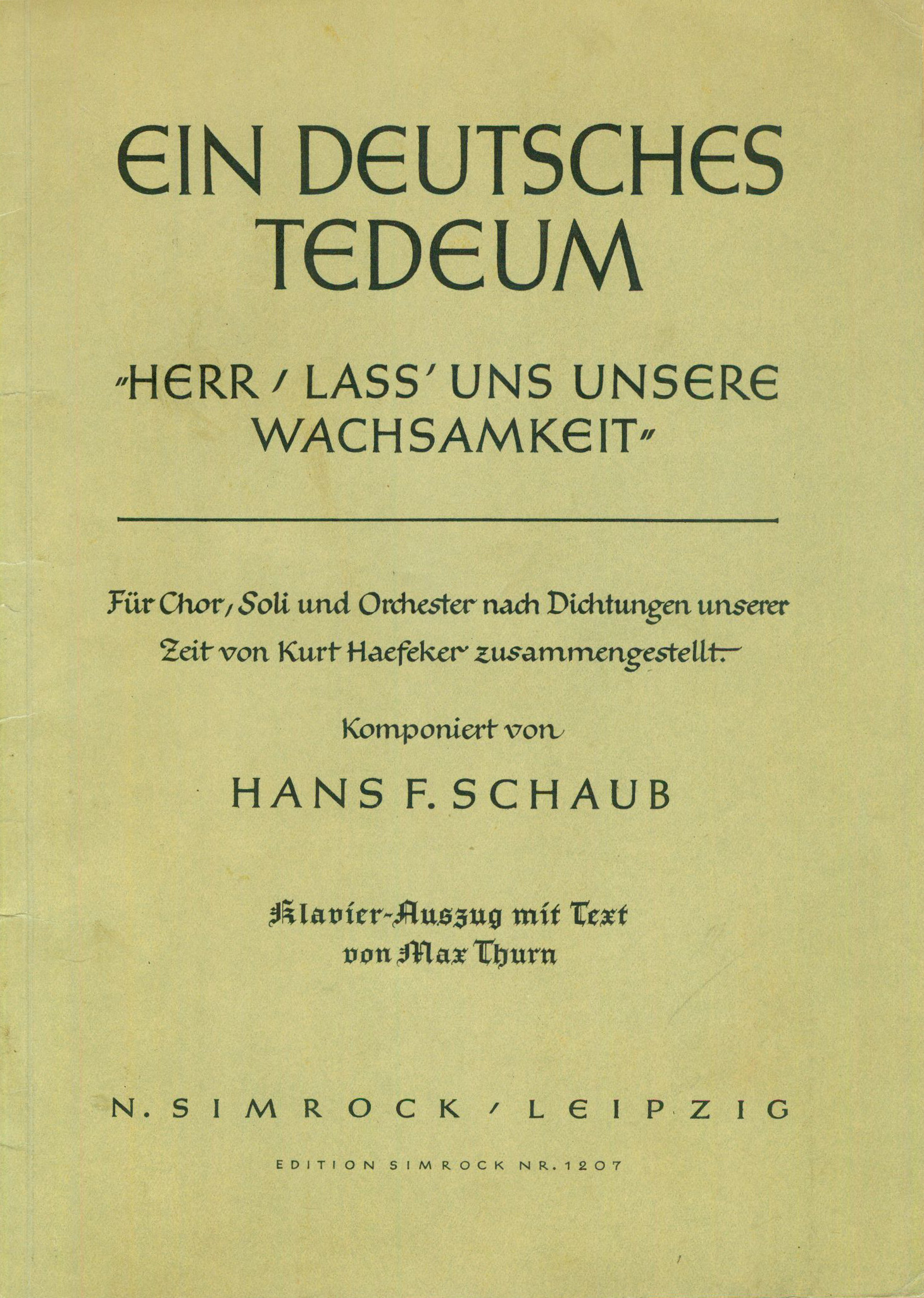 Titelblatt von Ein deutsches Tedeum „Herr, lass‘ uns unsere Wachsamkeit“ Für Chor, Soli und Orchester nach Dichtungen unserer Zeit von Kurt Haefeker zusammengesetllt. Komponiert von Hans F. Schaub Klavier-Auszug mit Text von Max Thurn N. Simrock, Leipzig Edition Simrock Nr. 1207